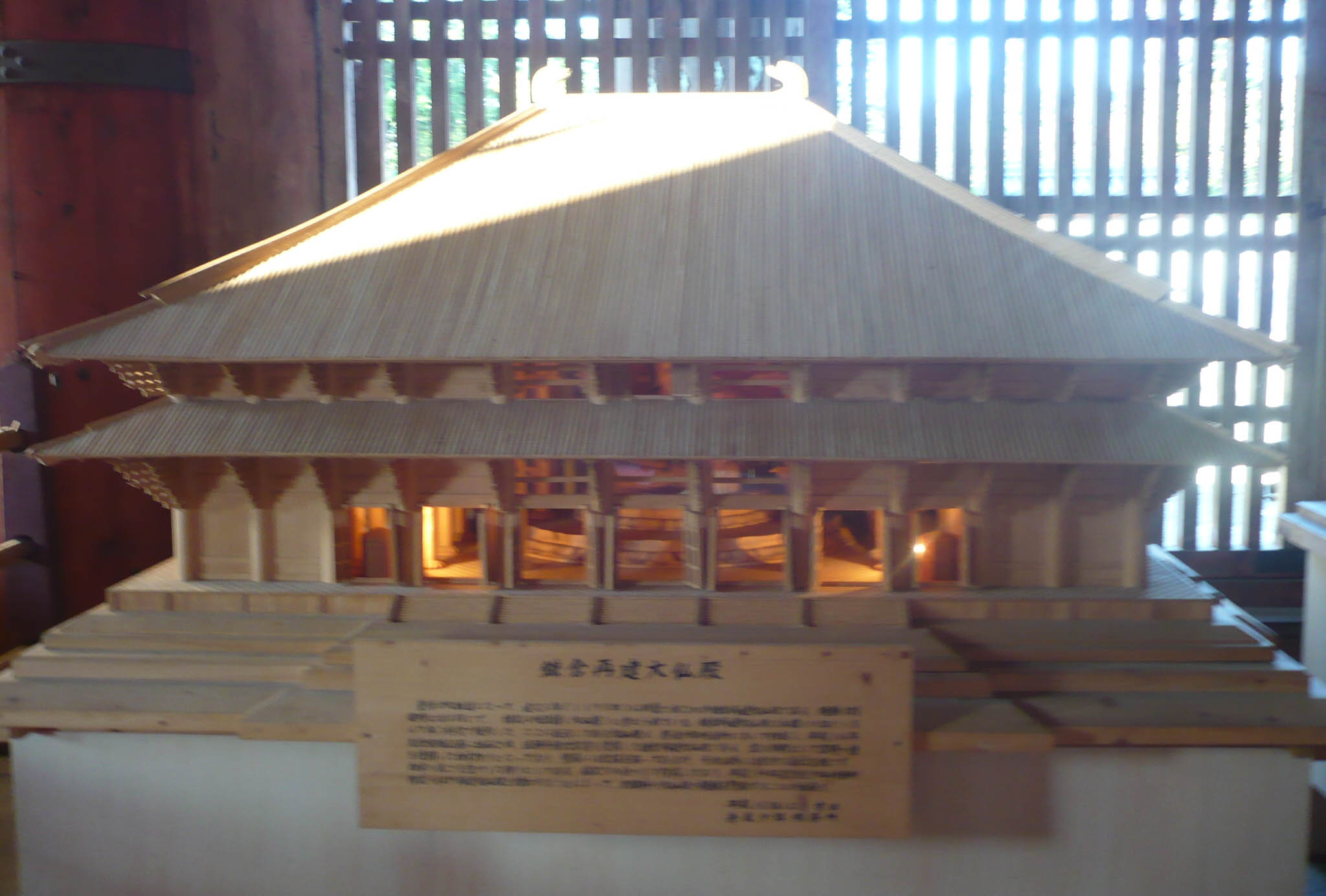 鎌倉再建大仏殿復元模型